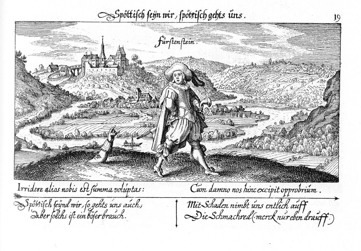 Ansicht der Burg Fürstenstein bei Albungen.